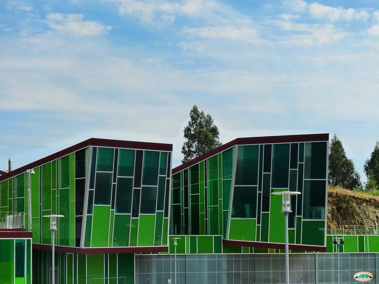 Arquitectura en verde